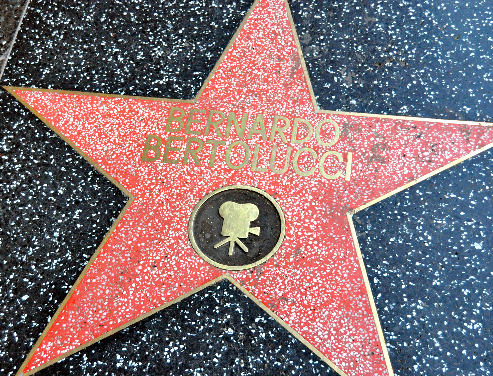 Los Angeles, California. 12.22.09.